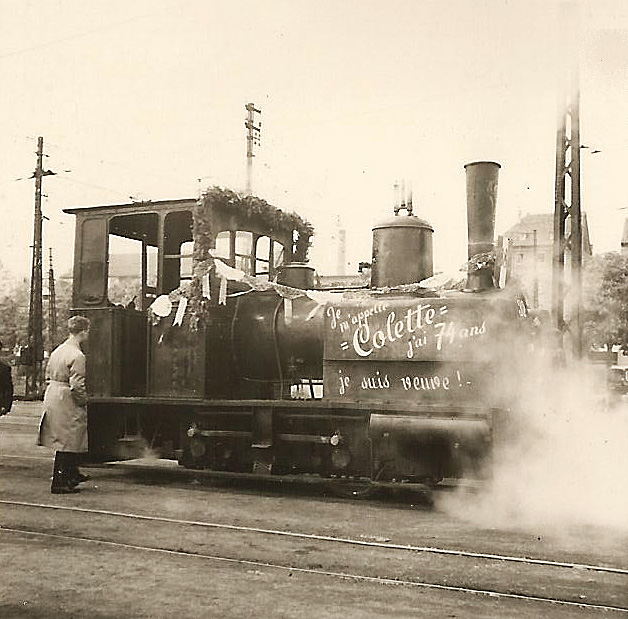 Funérailles du tramway de Strasbourg le 1er mai 1960 (photo de famille libre de droits)